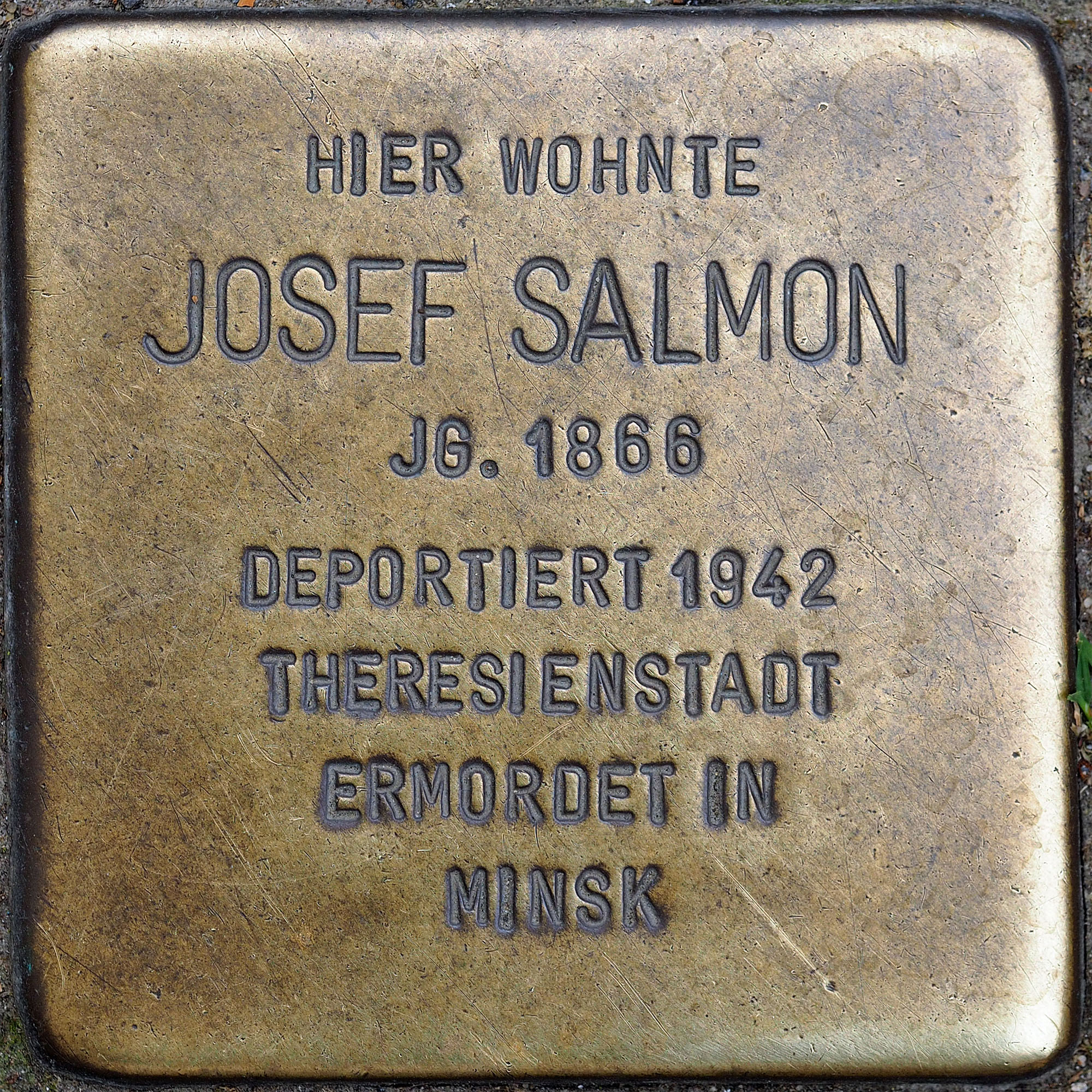 Stolpersteine MG: Salmon, Josef